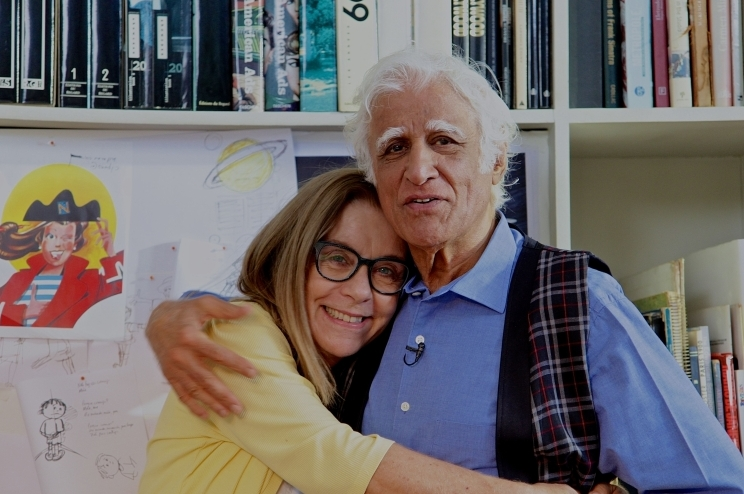 Dilea Frate (São Paulo, 1953) é uma jornalista e escritora brasileira.Ziraldo Alves Pinto (Caratinga, 24 de outubro de 1932) é um cartunista, chargista, pintor, dramaturgo, caricaturista, escritor, cronista, desenhista, humorista, colunista e jornalista brasileiro.